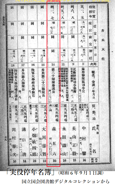 昭和６年版の実役停年名簿に記載される森五六歩兵大佐